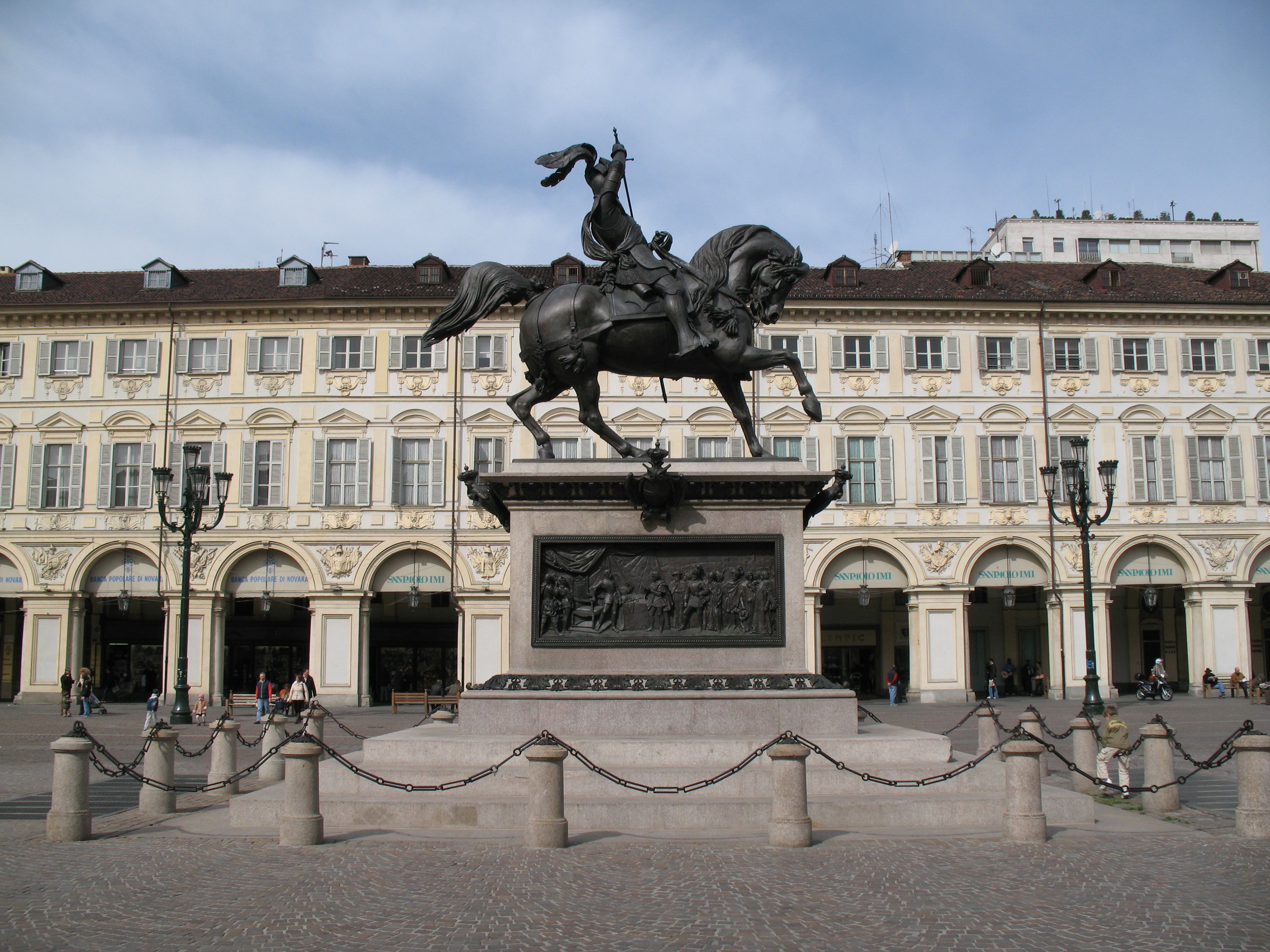 Statua equestre ad Emanuele Filiberto di Savoia - Piazza san Carlo - Torino - Italy